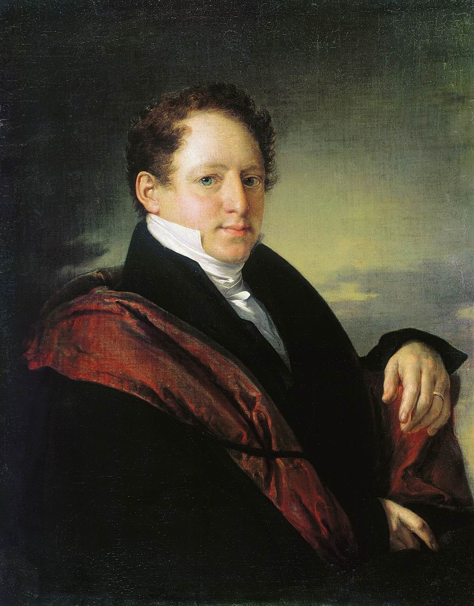 Тропинин В.А. (1780-1857) Портрет Степана Дмитриевича Нечаева. Конец 1820-х-начало 1830-х. Холст, масло. 77х64,5. Рязанский государственный областной художественный музей им. И.П. Пожалостина Инв. № 586-ж